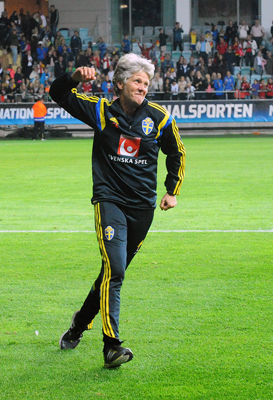 a_105_2086